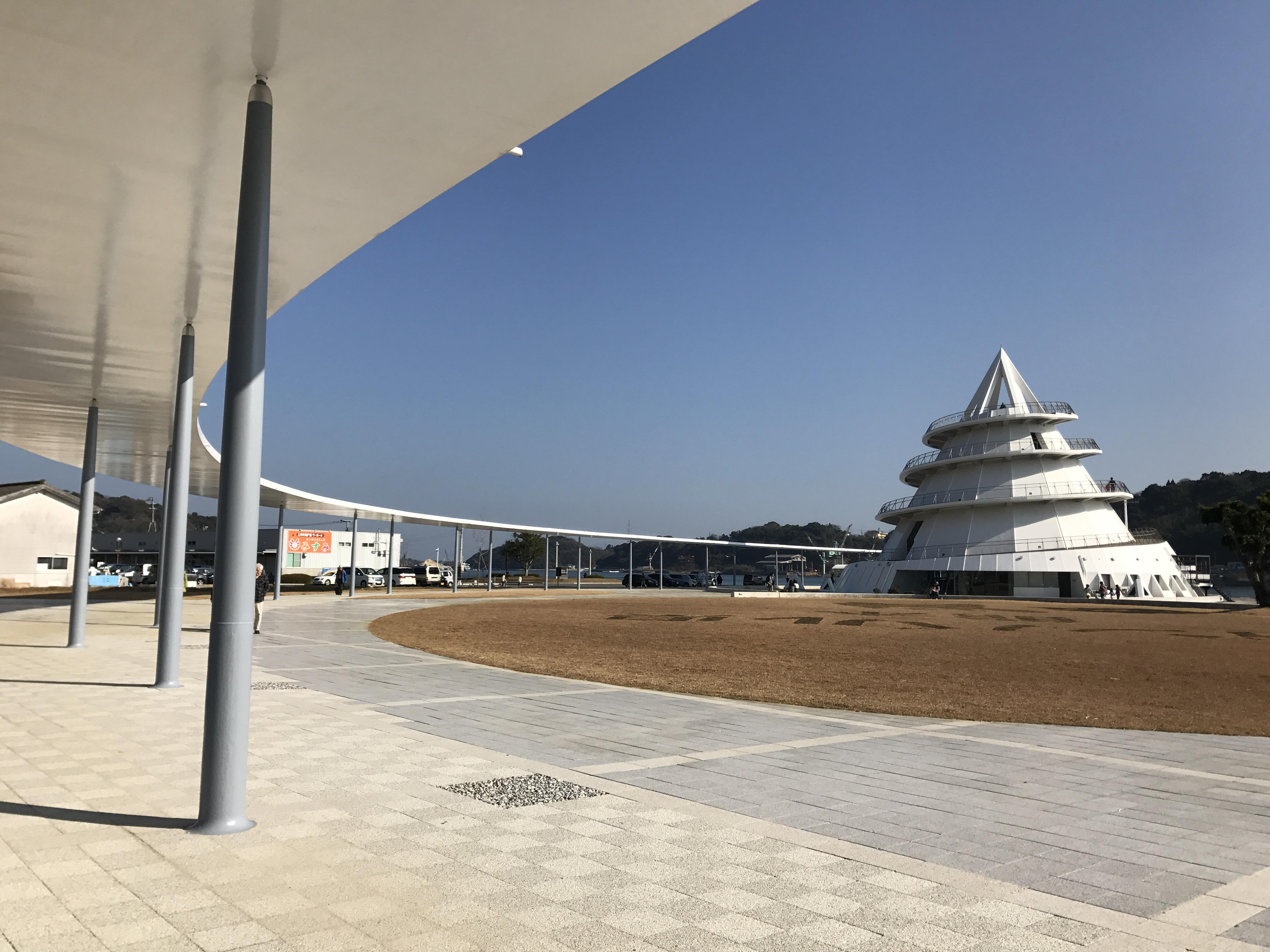 三角港フェリーターミナル・海のピラミッドの遠景